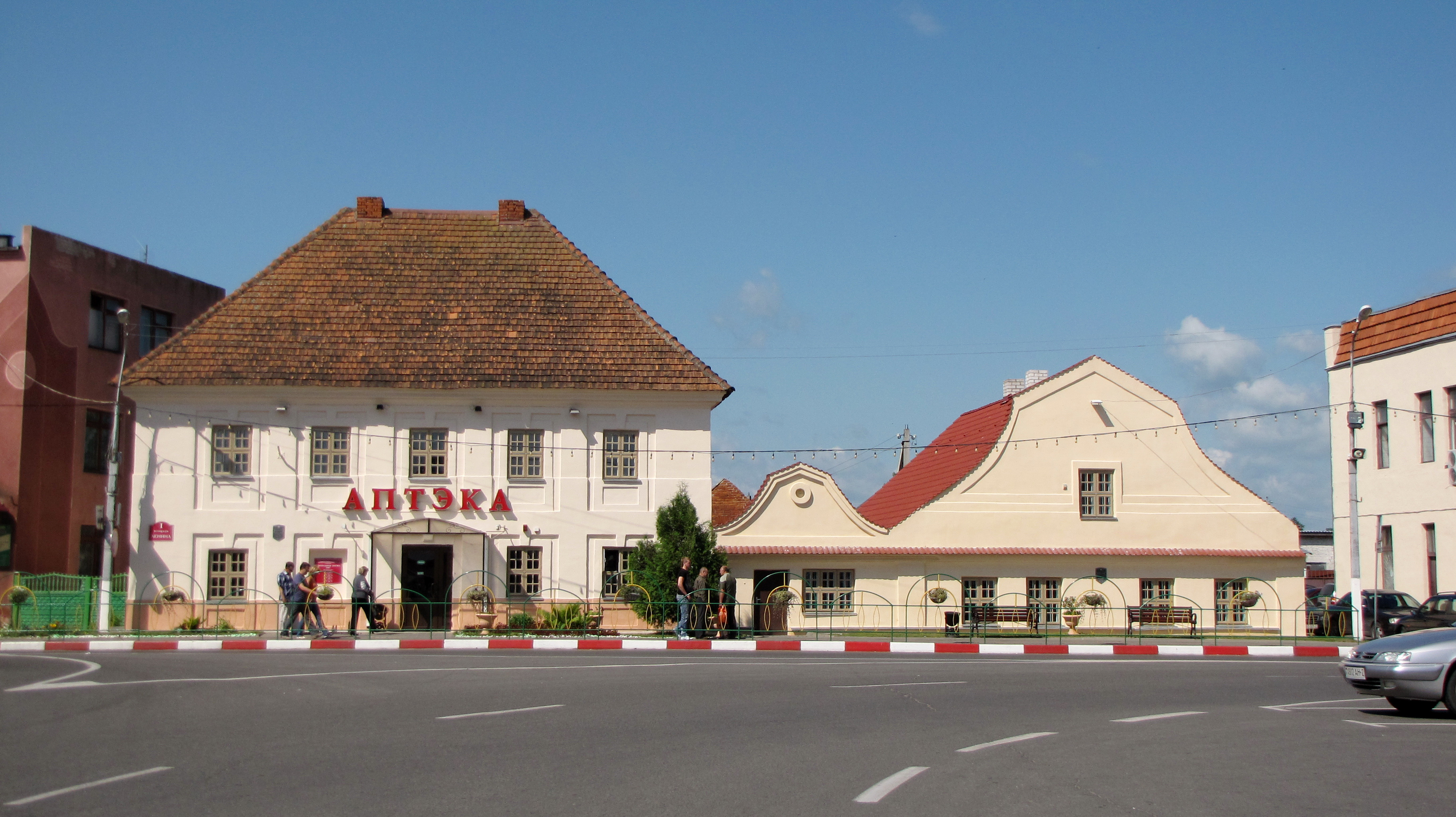 Беларуская (тарашкевіца): Архітэктурны ансамбль былой Рыначнай плошчы. г. Паставы